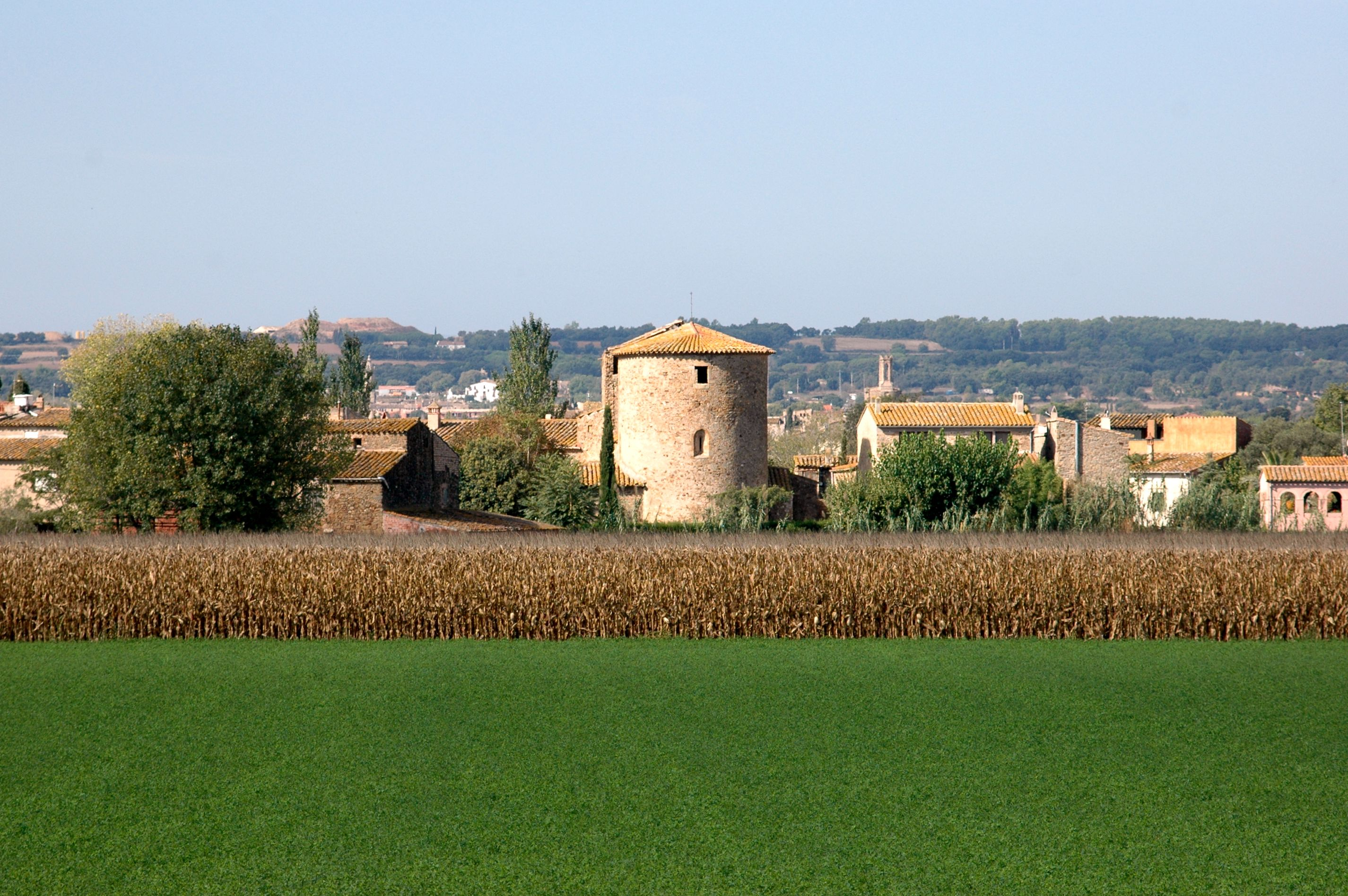 Fonolleres